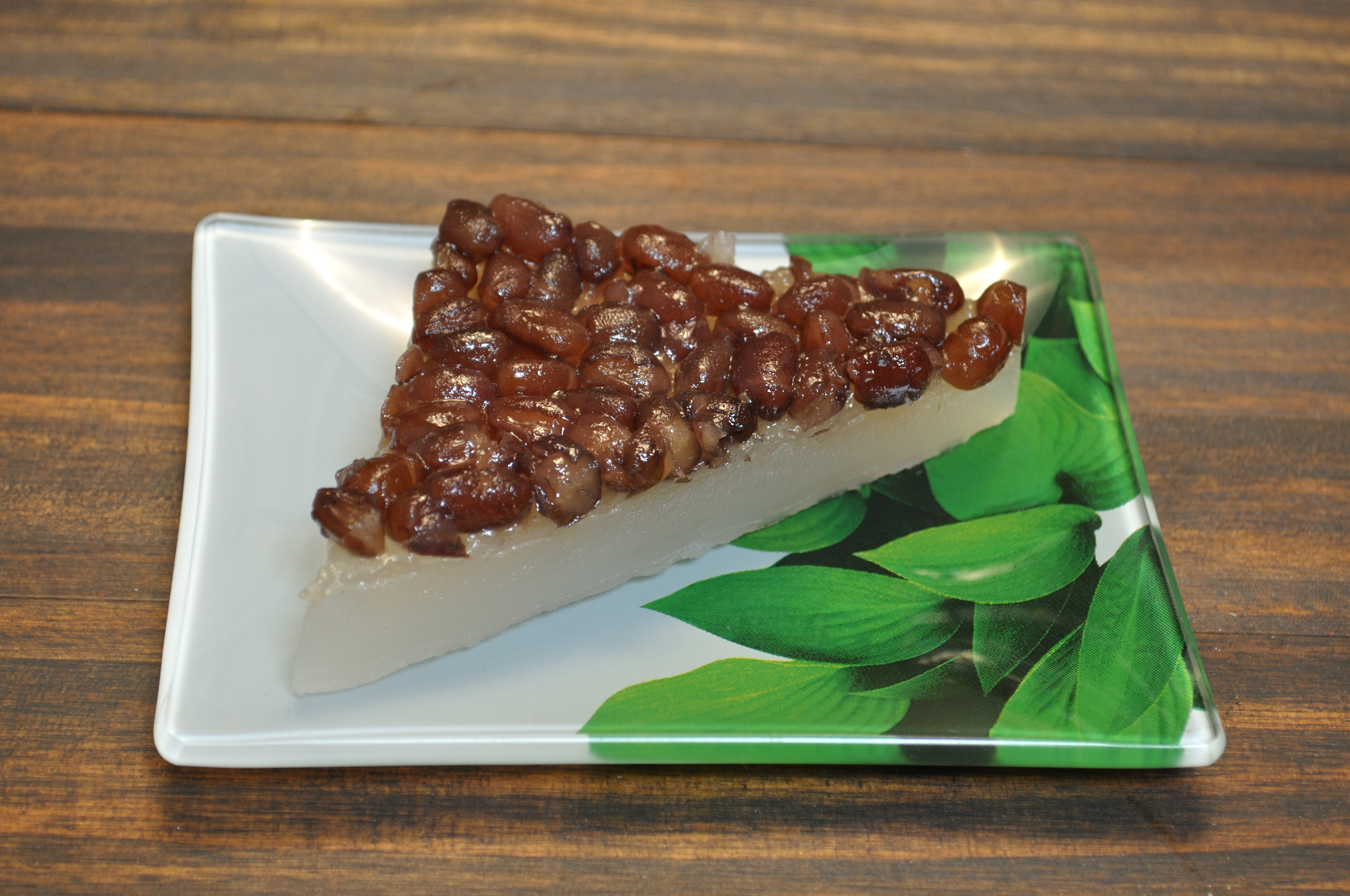 6月30日に無病息災を祈念して食べる風習のある水無月の参考画像